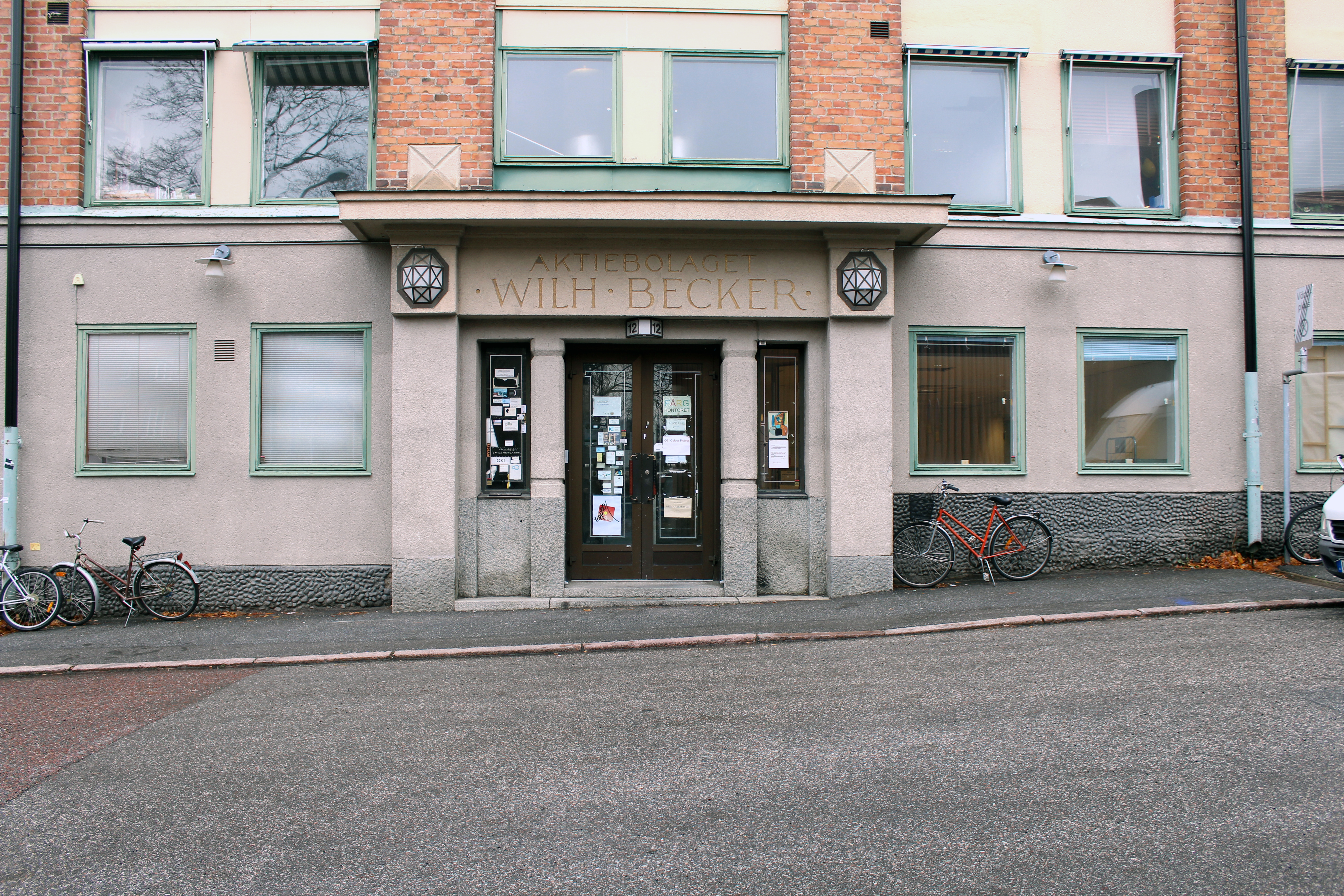 Entrén till Färgkontorethuset på Lövholmsgränd i Liljeholmen